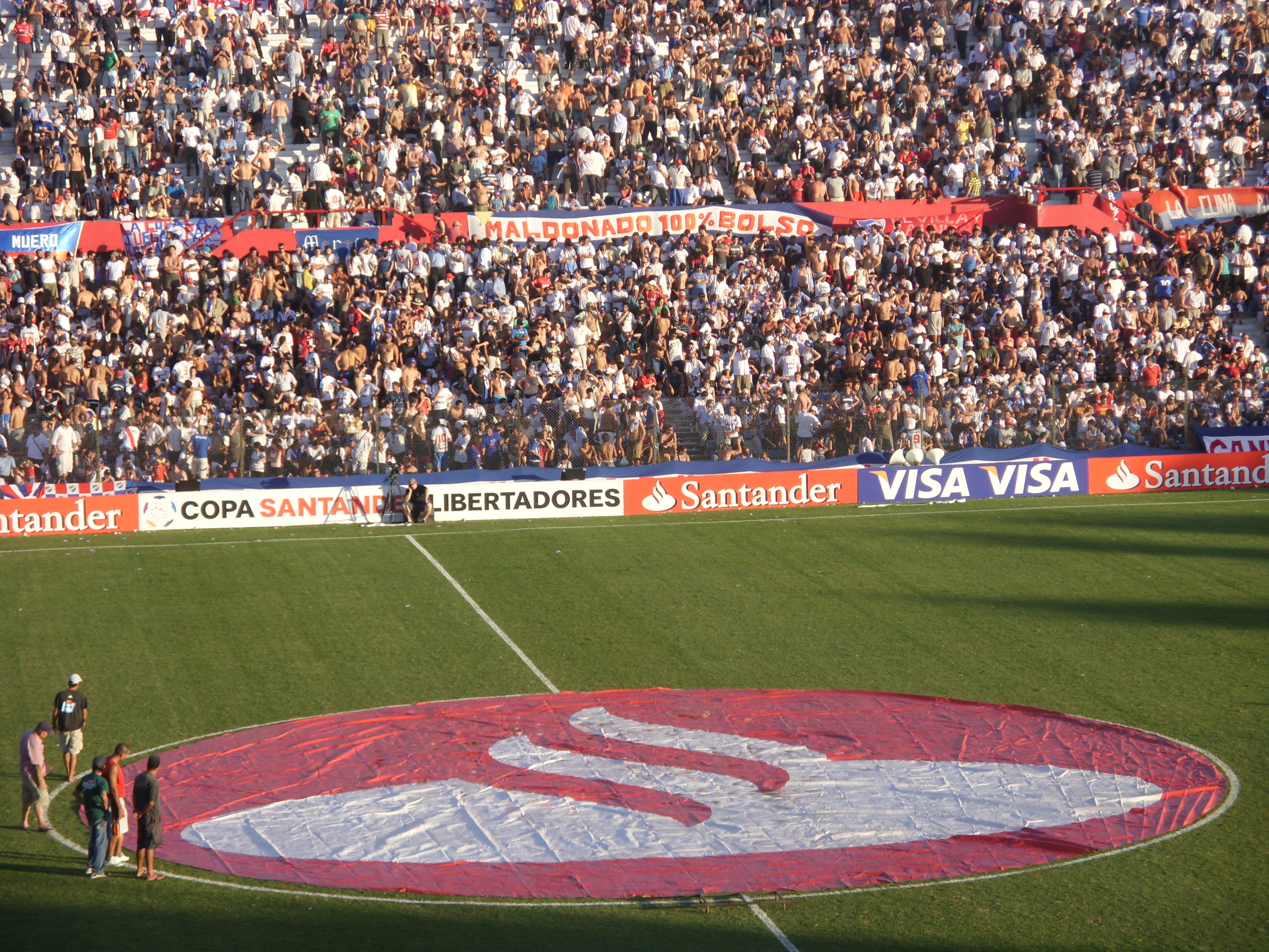 Césped del Estadio Gran Parque Central